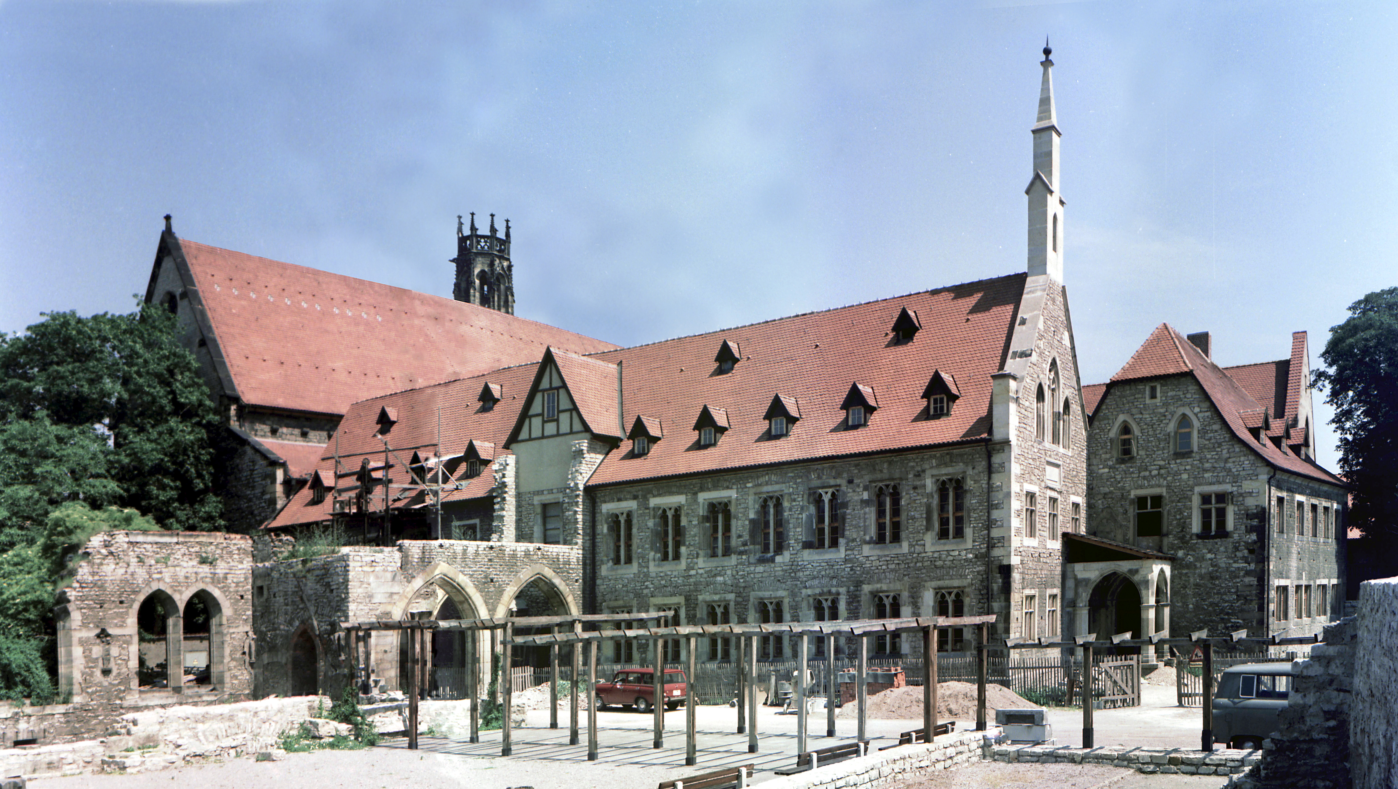 04.07.1985 DDR 5010 [99084] Erfurt: Das Augustinerkloster (GMP: 50.981273,11.030117), ab 1277 erbautes, ehemaliges Kloster der Augustiner-Eremiten, in dem Martin Luther zwischen 1505 und 1512 als Mönch lebte. Nach der Reformation ging das Kloster 1525 in den Besitz der Evangelischen Kirche über; 1559 wurde es von der Stadt Erfurt säkularisiert. 1945 wurden Teile des Klosters bei einem Luftangriff zerstört. [F19850703A52+A54+A56+A58.JPG]19850704500MNR.JPG(c)Blobelt